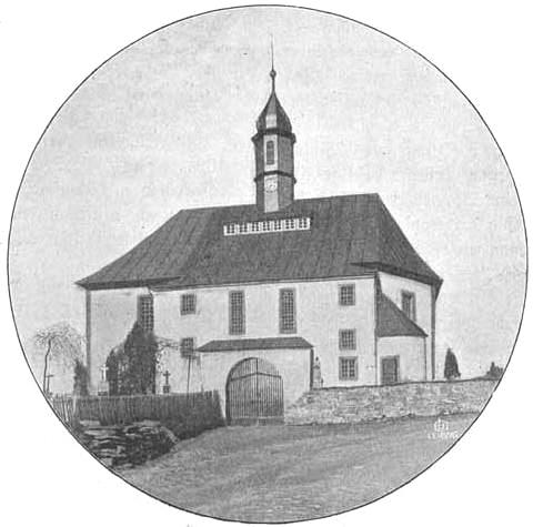 Die Kirche von Breitenbrunn um 1900 /The church of Breitenbrunn in ca. 1900